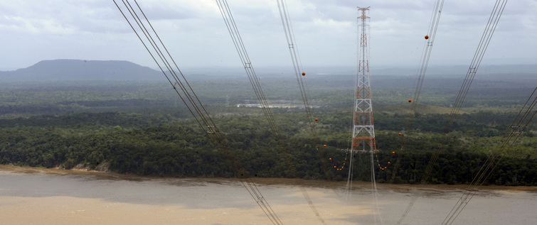 Data: 08/04/2014 Local: Almeirim, PA Pauta: Obras do linhao de Tucurui - vista da torre do morro fotografada da torre do rio com linhoes interligados e rio Amazonas abaixo.